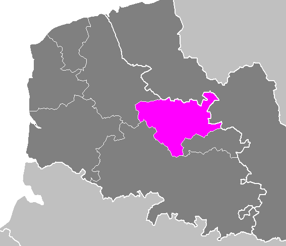 Arrondissement_de_Béthun